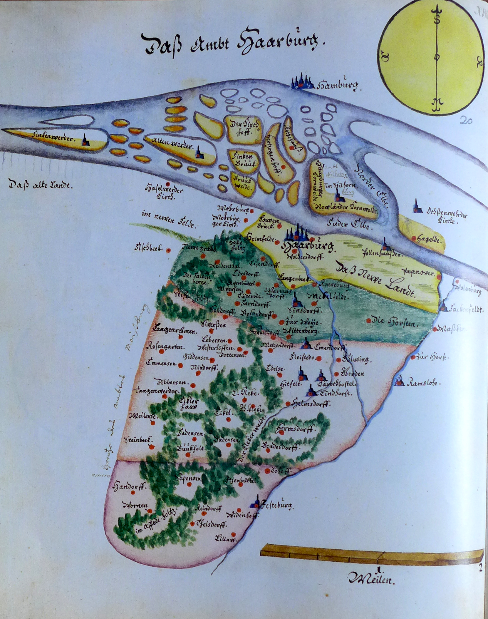 Ämteratlas des Fürstentums Lüneburg von Johannes Mellinger, um 1600 – Reproduktion der im Niedersächsischen Landesarchiv, Abteilung Hannover, lagernden Kopie um 1678 (vgl.